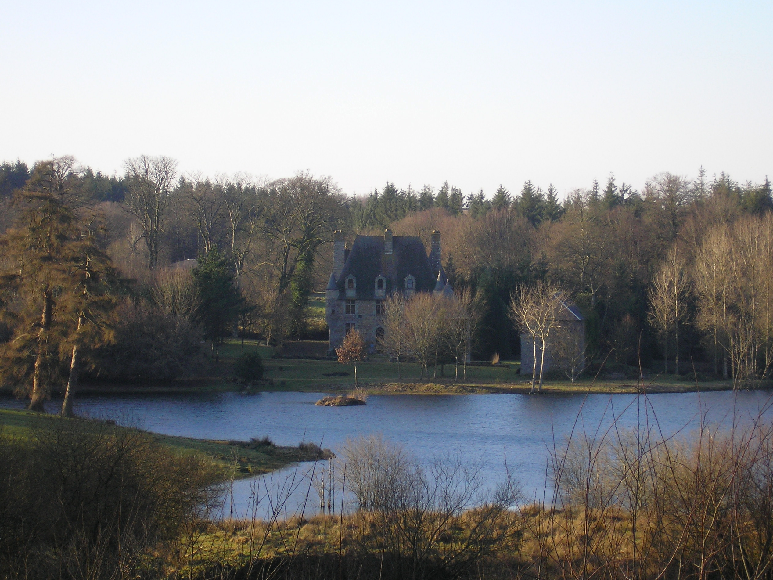 Chaulieu (Normandie, France). Le château et son étang.